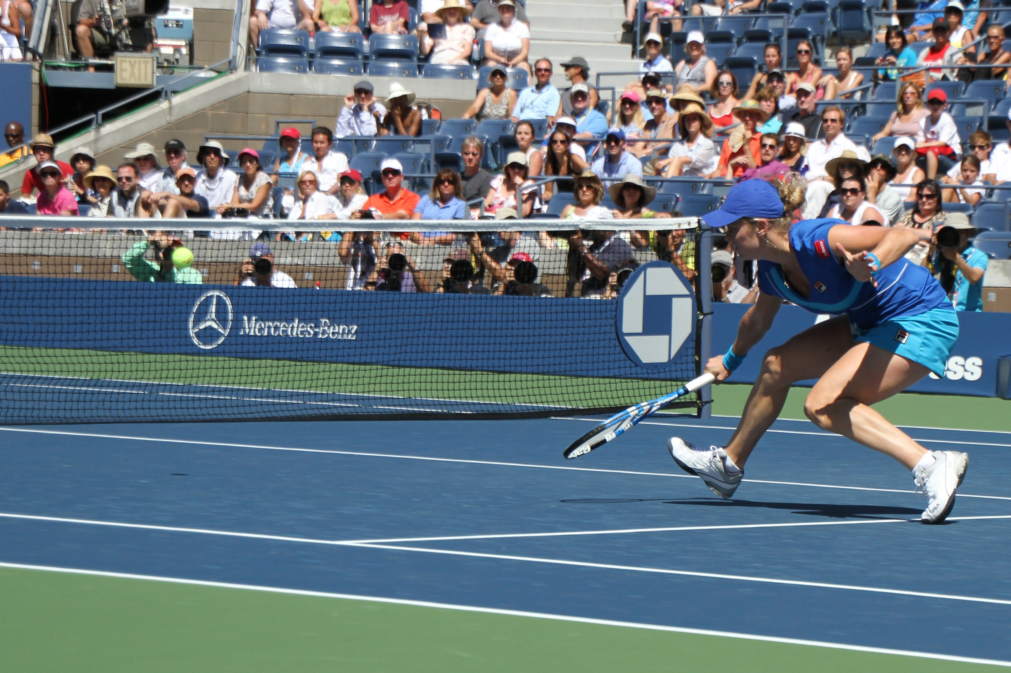 Kim Clijsters